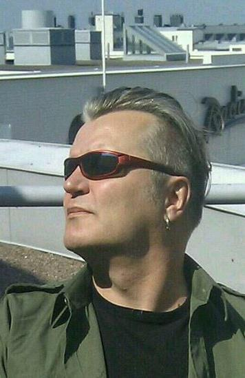 Helsingin katolla